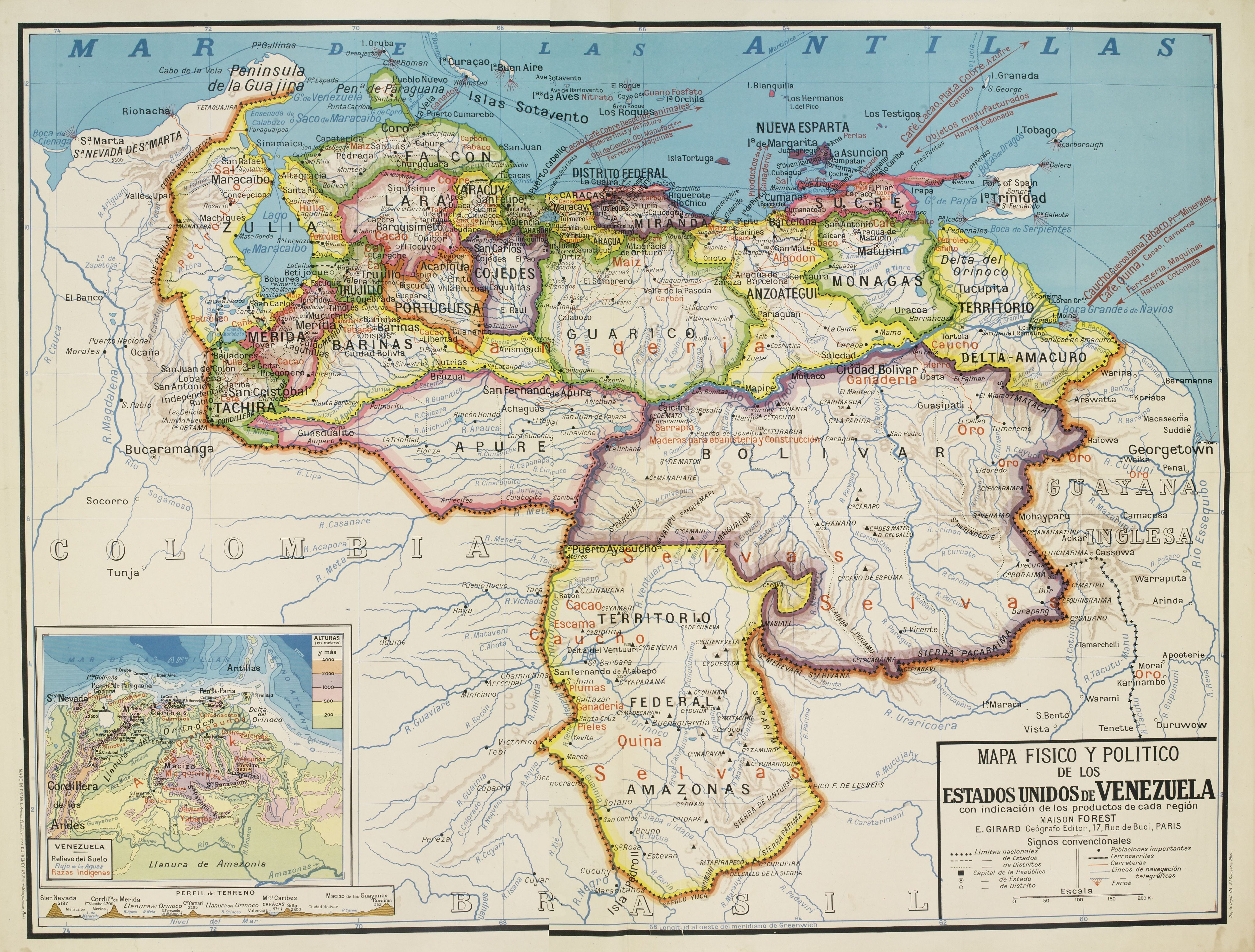 Mapa físico y político de los Estados Unidos de Venezuela